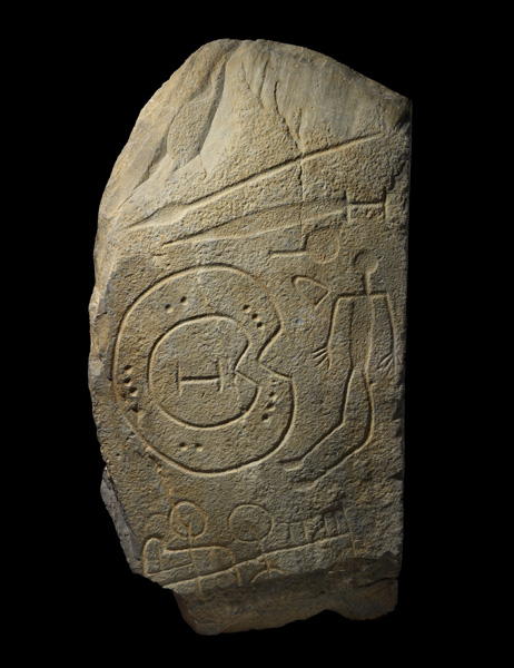 Estela de Solana de Cabañas (Bronce Final). Número de inventario: 1898-1-1.